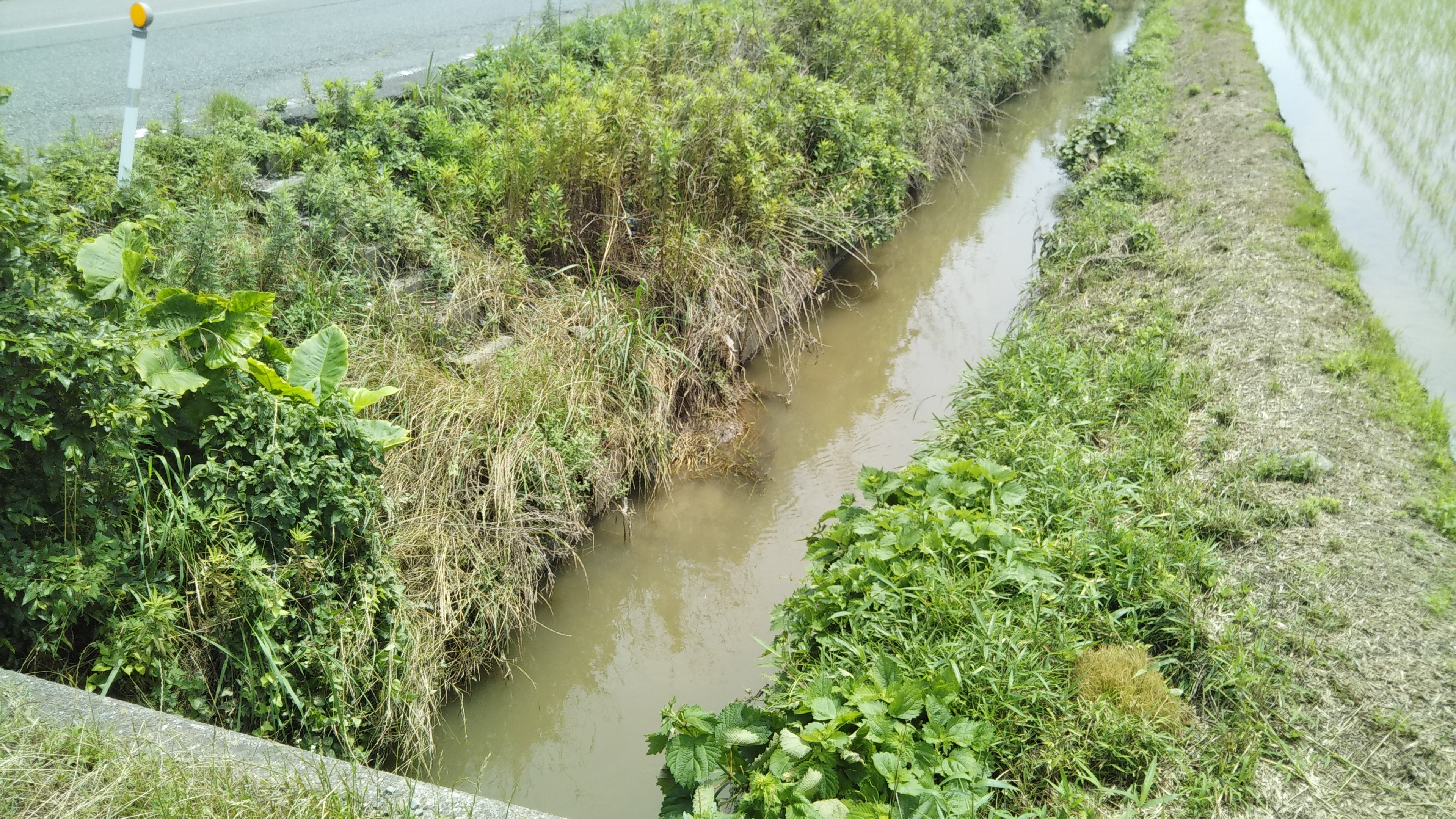 18世紀前半に作られた山口県下関市大字綾羅木の灌漑用水路